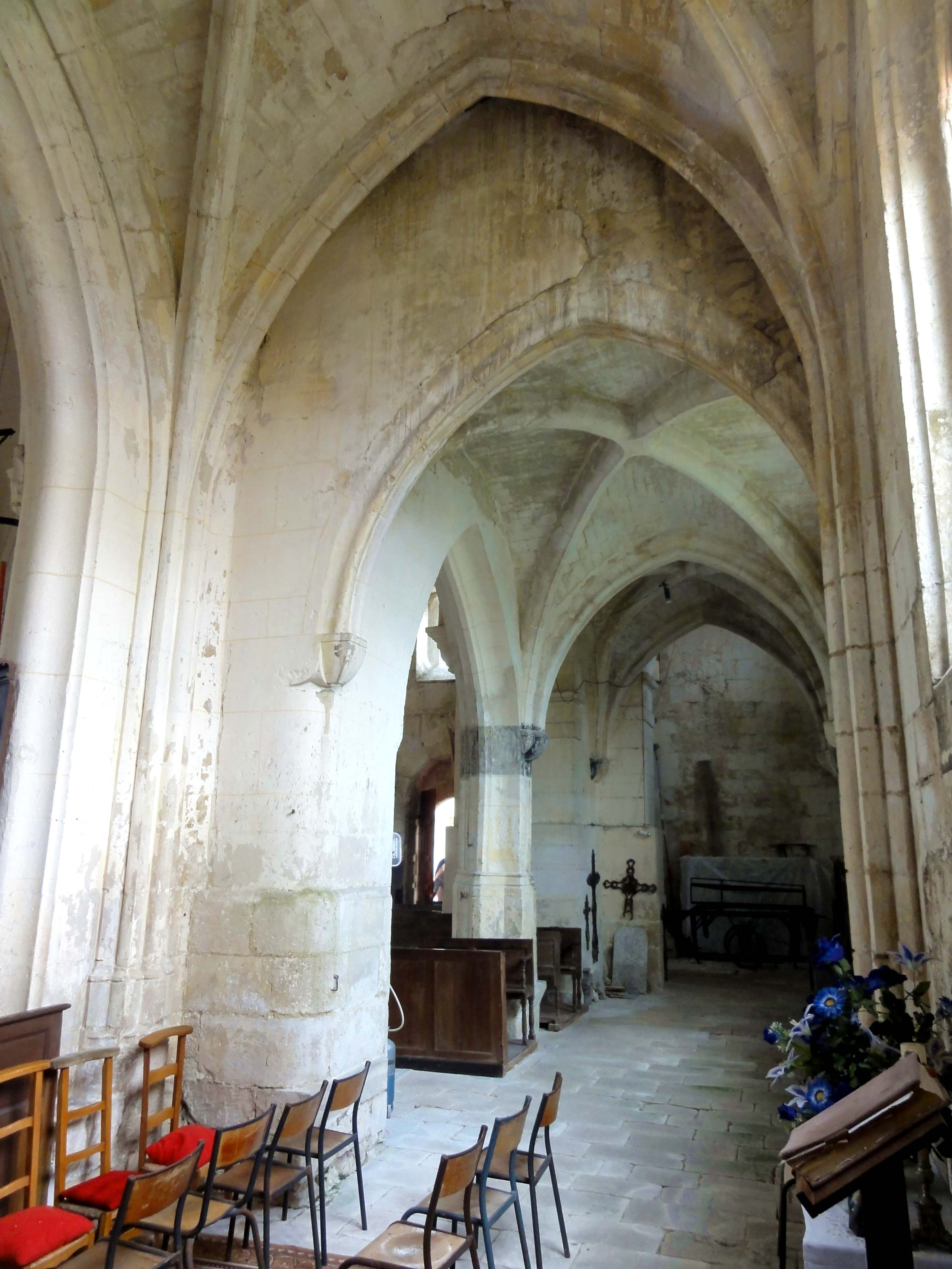 Intérieur de l'église - voir titre.